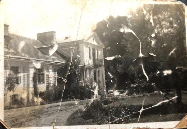 Front budynku Dworu Stara Wieś.